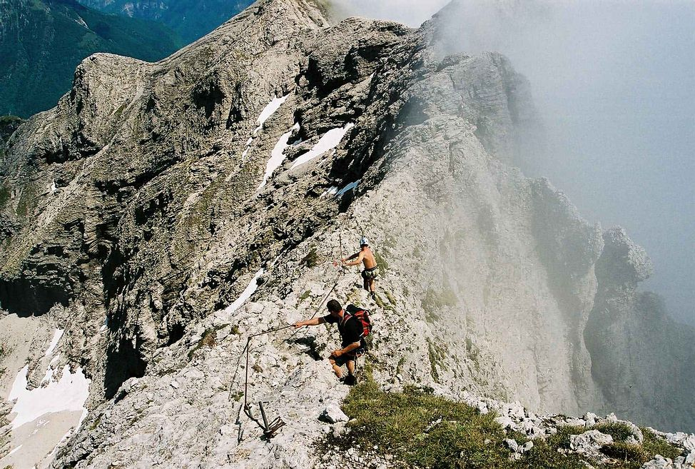 Ferrata Luigi Zacchi (masiv Monte Schiara)